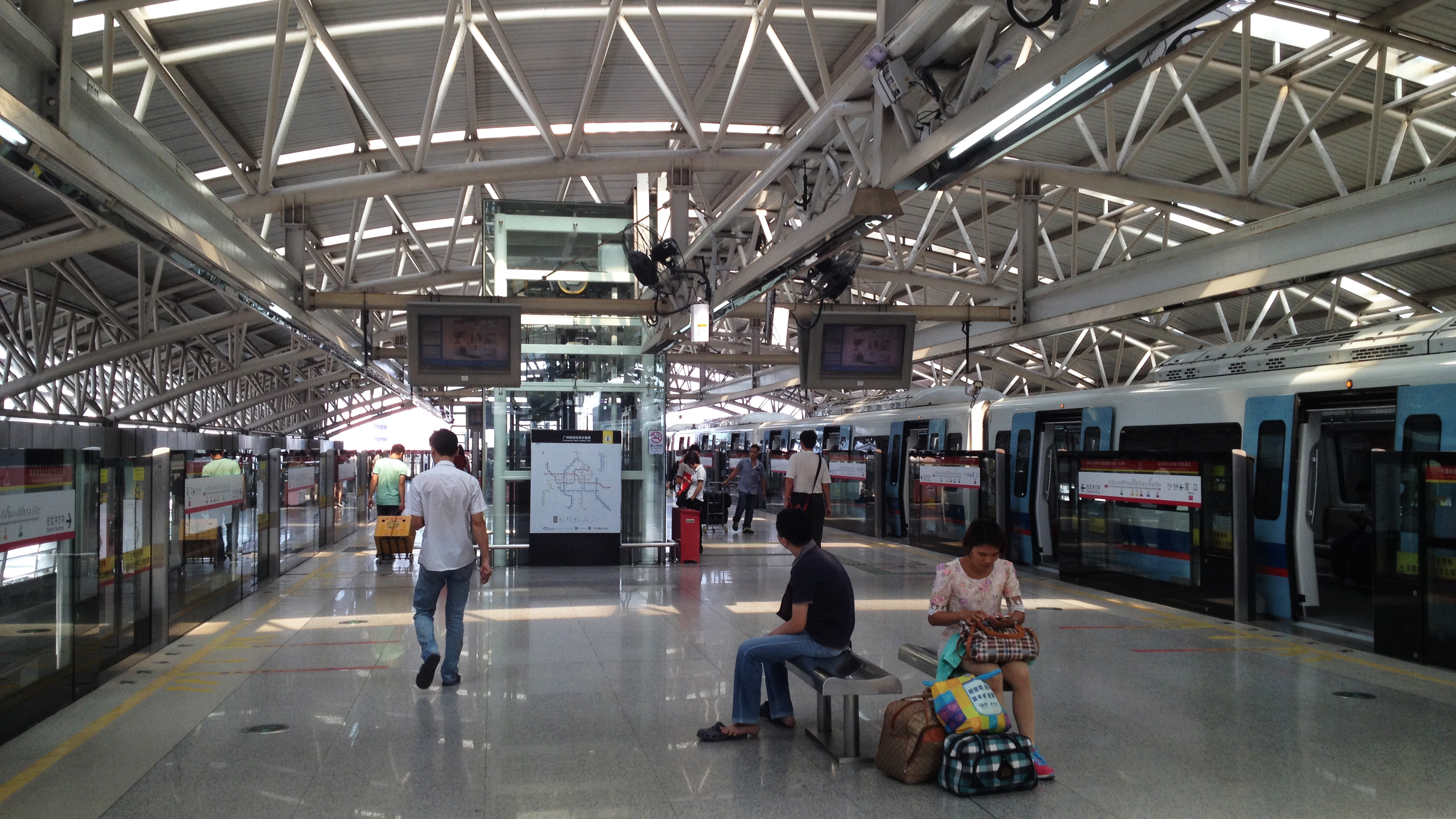 广州地铁滘口站月台